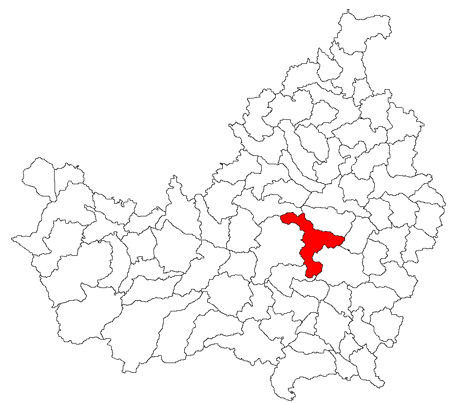 Comuna Apahida, judeţul Cluj